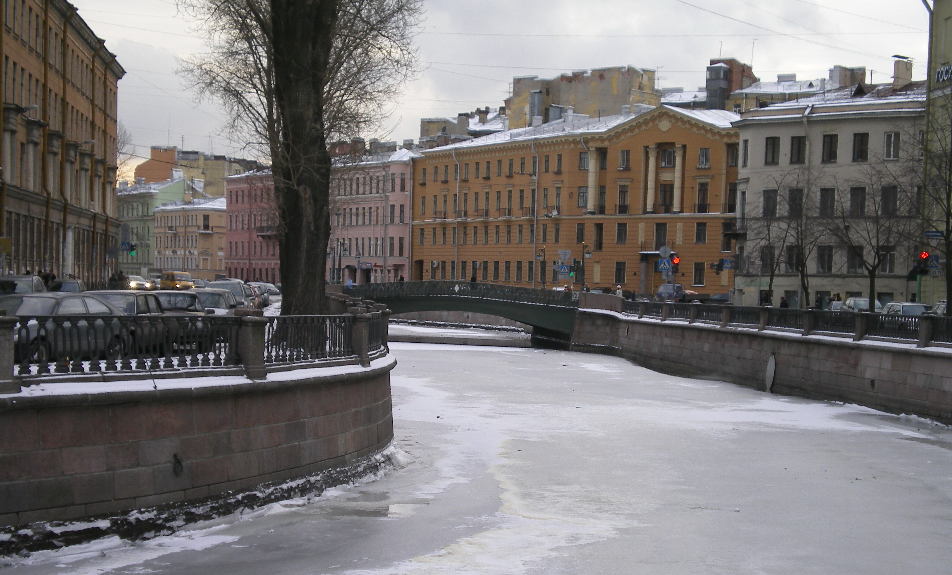 Демидов мост в городской застройке